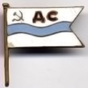 Знак флота Дальстроя. Учреждён Постановлением СНК СССР за ударную работу на судах и береговых объектах.